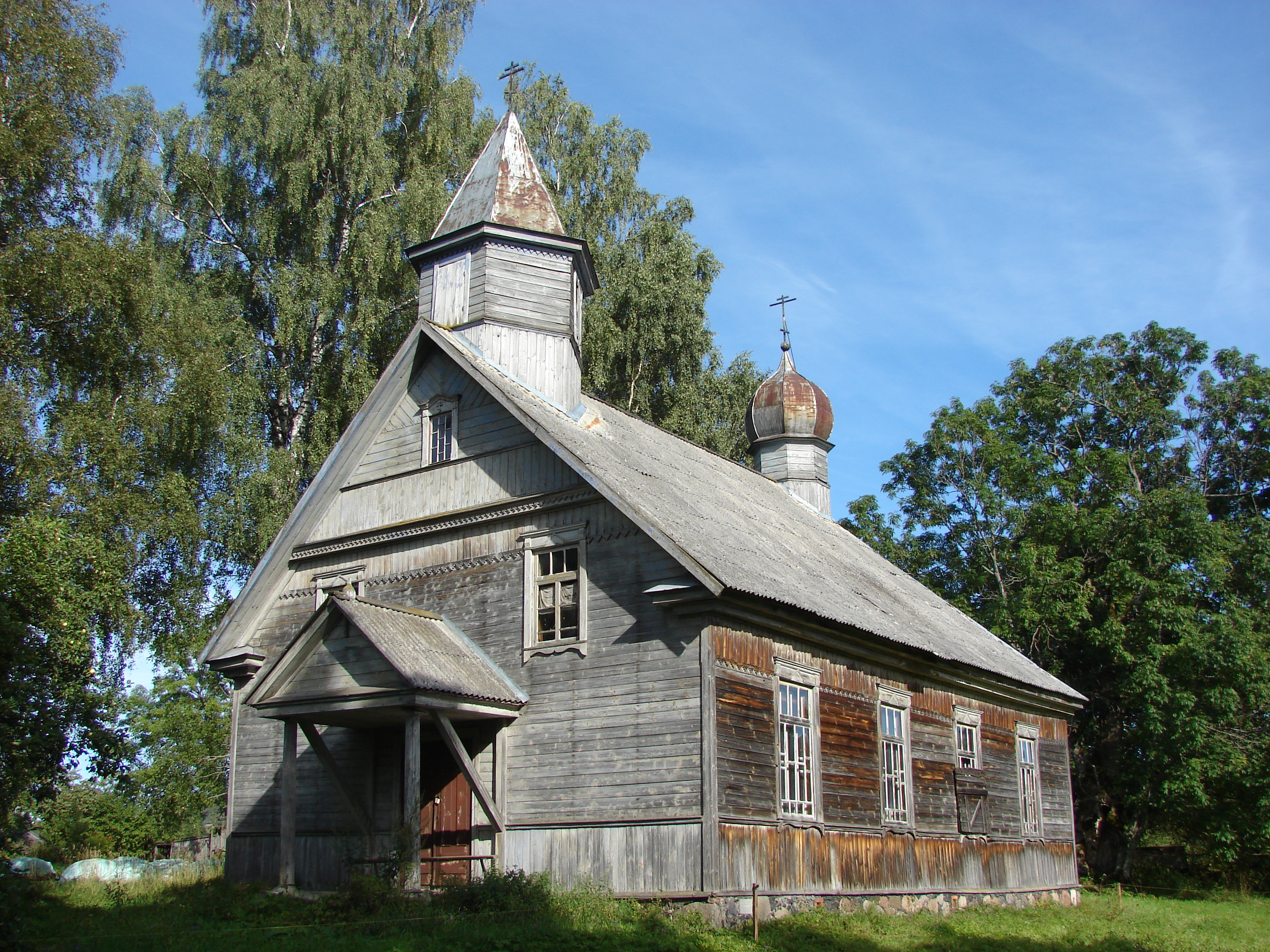 Maslovas vecticībnieku lūgšanu nams, Andrupenes pagasts, Dagdas novads, Latvia